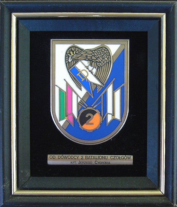 Znak 2 batalionu czołgów z 4 BKPanc - Orzysz